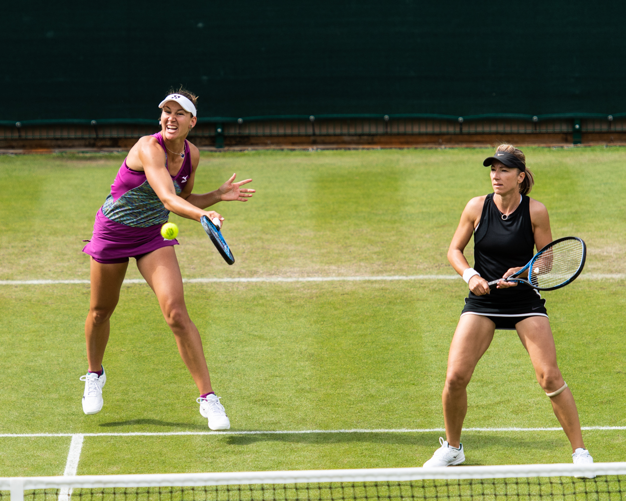 Nicole Melichar & Kveta Peschke